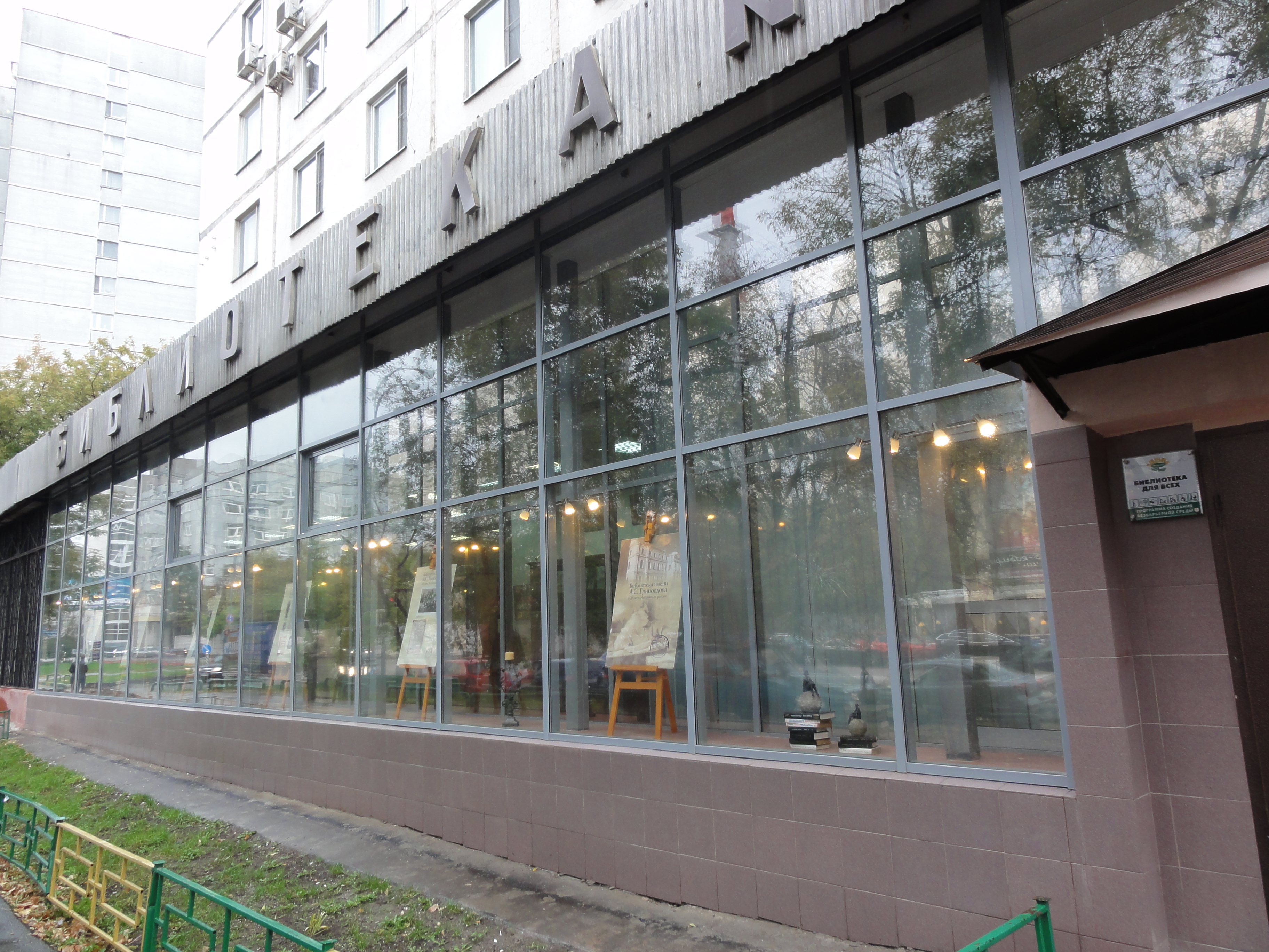 Фотография Библиотеки имени А.С. Грибоедова 23.09.2011